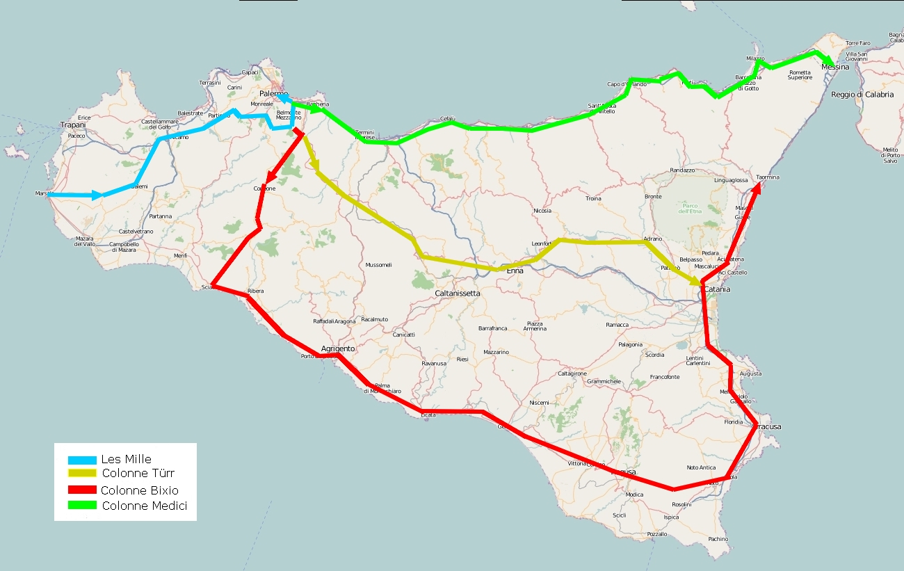 Lors de l'expédition des Mille, Les garibaldiens se partagent en trois colonnes pour la conquête de l'île. La brigade de István Türr (Stefano Türr en italien), puis commandée par Eber, avec environ cinq cents hommes, part à l'intérieur de l'île, Bixio avec environ 1,700 hommes pour Catane, d'Agrigente, et Medici avec Cosenz aux commandes de la colonne la plus importante avance le long de la côte septentrionale